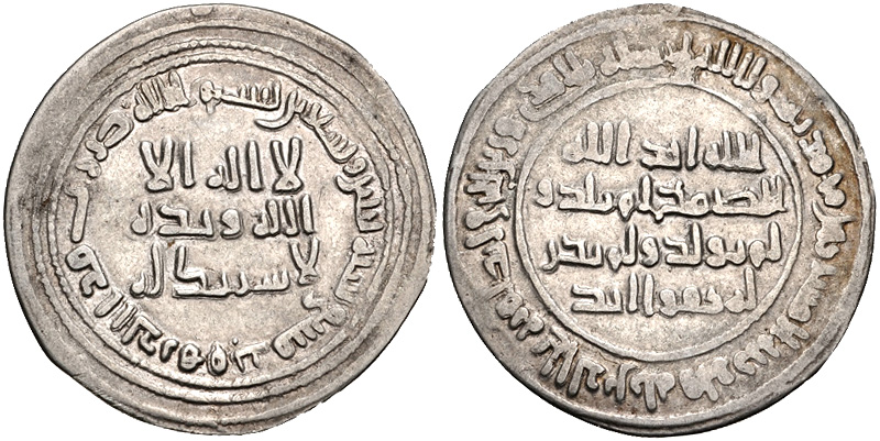 Dirrã do califa omíada Solimão ibne Abdal Malique